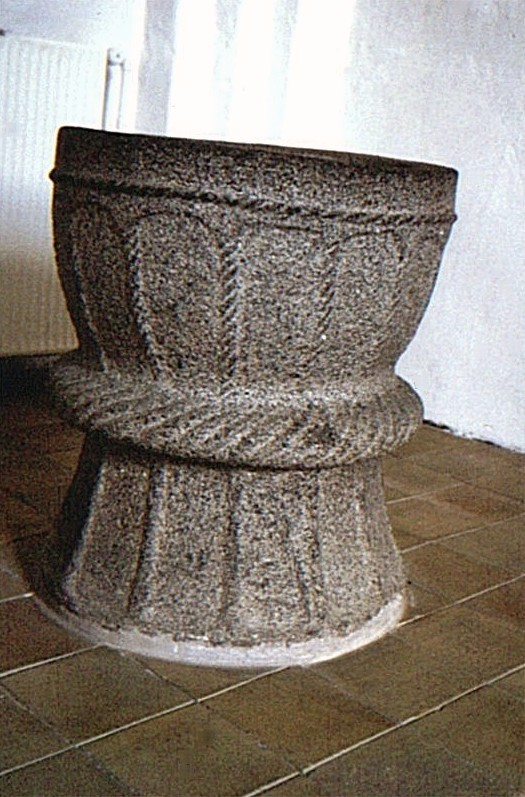 Lunde Kirke i Danmark. Døbefont